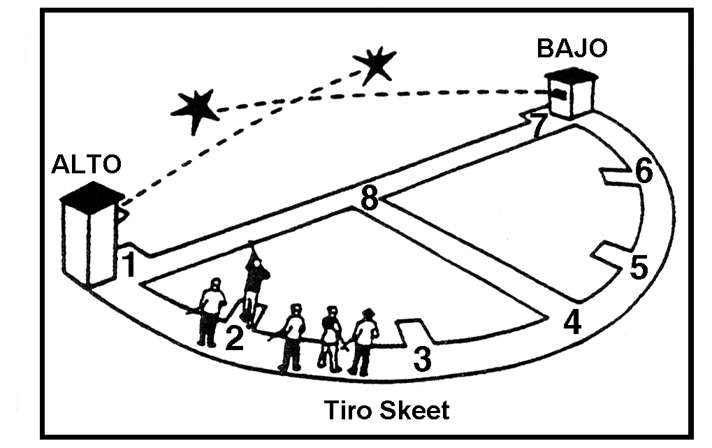 Cancha de tiro skeet